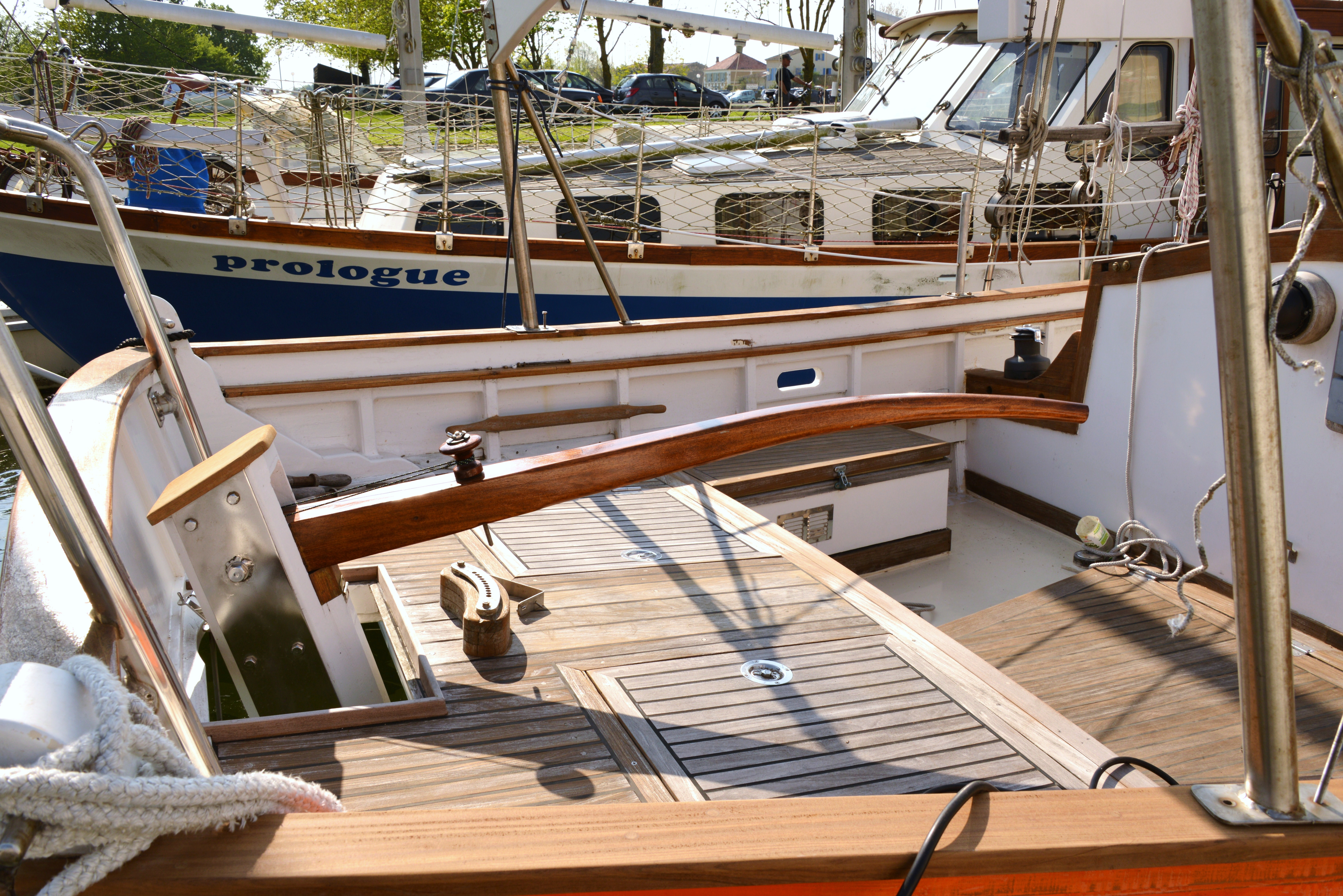 La barre franche et le cockpit. La goélette « Ayla » amarrée au Quai des Pêcheurs dans le port de Mortagne-sur-Gironde. Cette goélette lancée en 2003 est un Schpountz 38-40 (le n° 49). Architecte naval Daniel Z. Bombigher. Mortagne-sur-Gironde, Charente-Maritime, France.